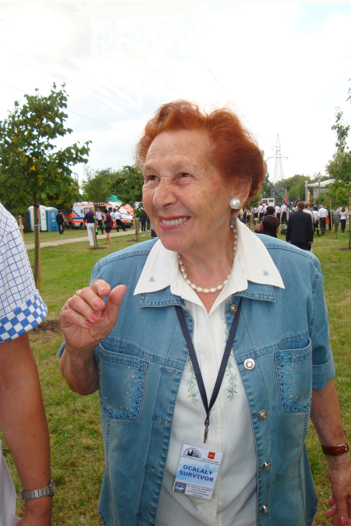 Rachel Grynfeld w Łodzi 27 sierpnia 2009 fot M Z Wojalski 3516